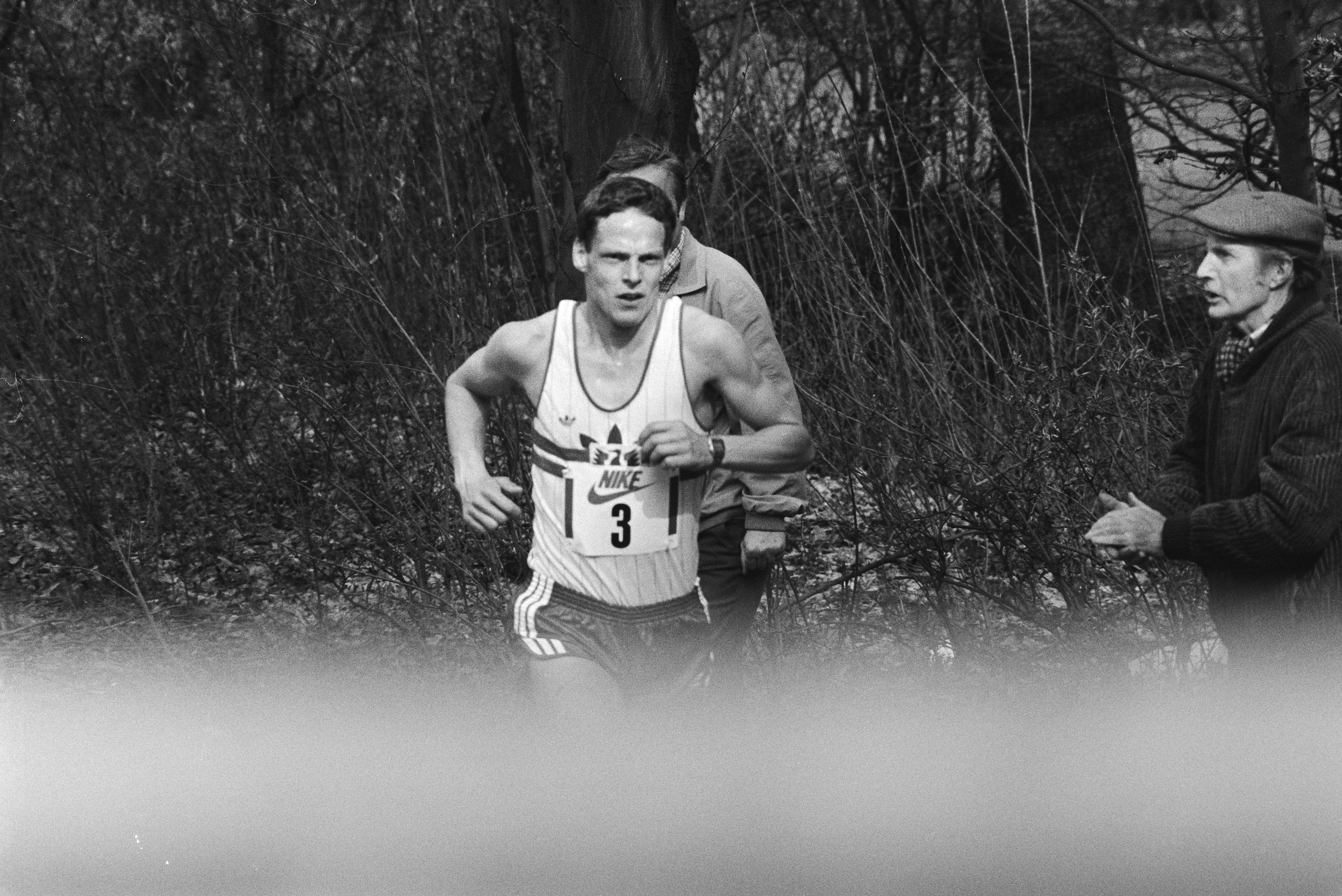 Collectie / Archief : Fotocollectie Anefo Reportage / Serie : Marathon van Rotterdam 1983 Beschrijving : Gerard Nijboer eenzaam onderweg Datum : 10 april 1983 Locatie : Rotterdam, Zuid-Holland Trefwoorden : hardlopen, marathon Persoonsnaam : Nijboer, Gerard Fotograaf : Croes, Rob C. / Anefo Auteursrechthebbende : Nationaal Archief Materiaalsoort : Negatief (zwart/wit) Nummer archiefinventaris : bekijk toegang 2.24.01.05 Bestanddeelnummer : 932-5559